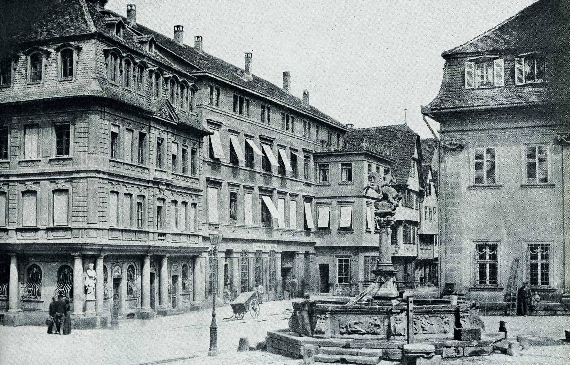 Der Hafenmarkt in Heilbronn mit Einhorn-Apotheke (Eckhaus links), St. Georgsbrunnen und Kraichgauarchiv (Eckhaus rechts).